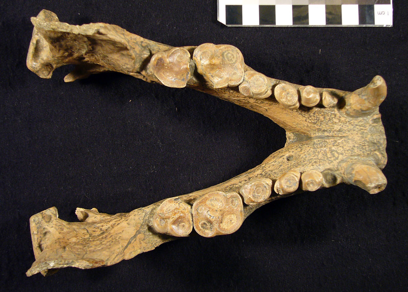 Kolponomos clallamensis mandible